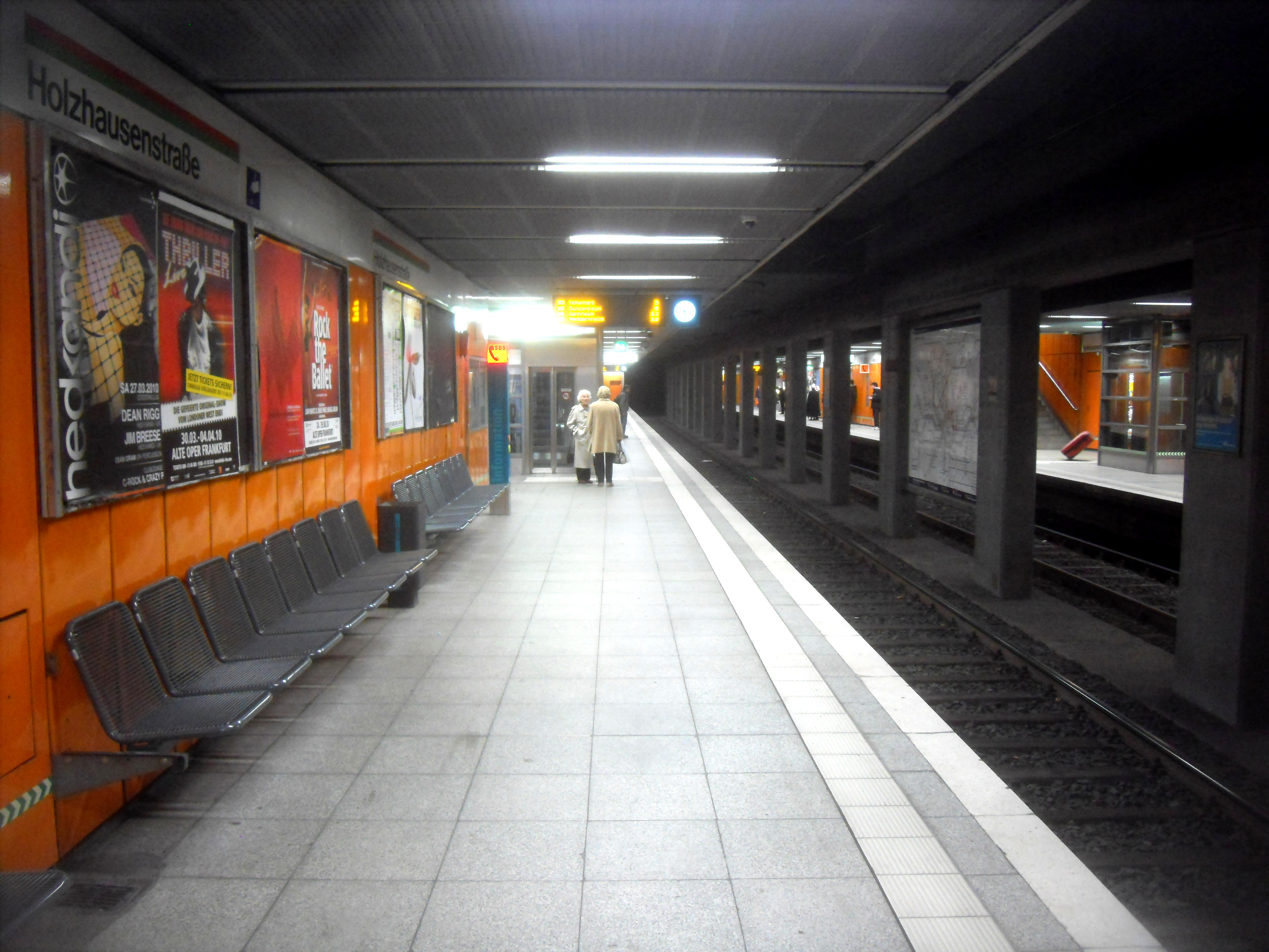 Bahnsteig des U-Bahnhofs Holzhausenstraße (Richtung Ginnheim, Gonzenheim, Hohemark) der U-Bahn Frankfurt auf den Linien U 1 bis U 3 in Hessen (Deutschland)